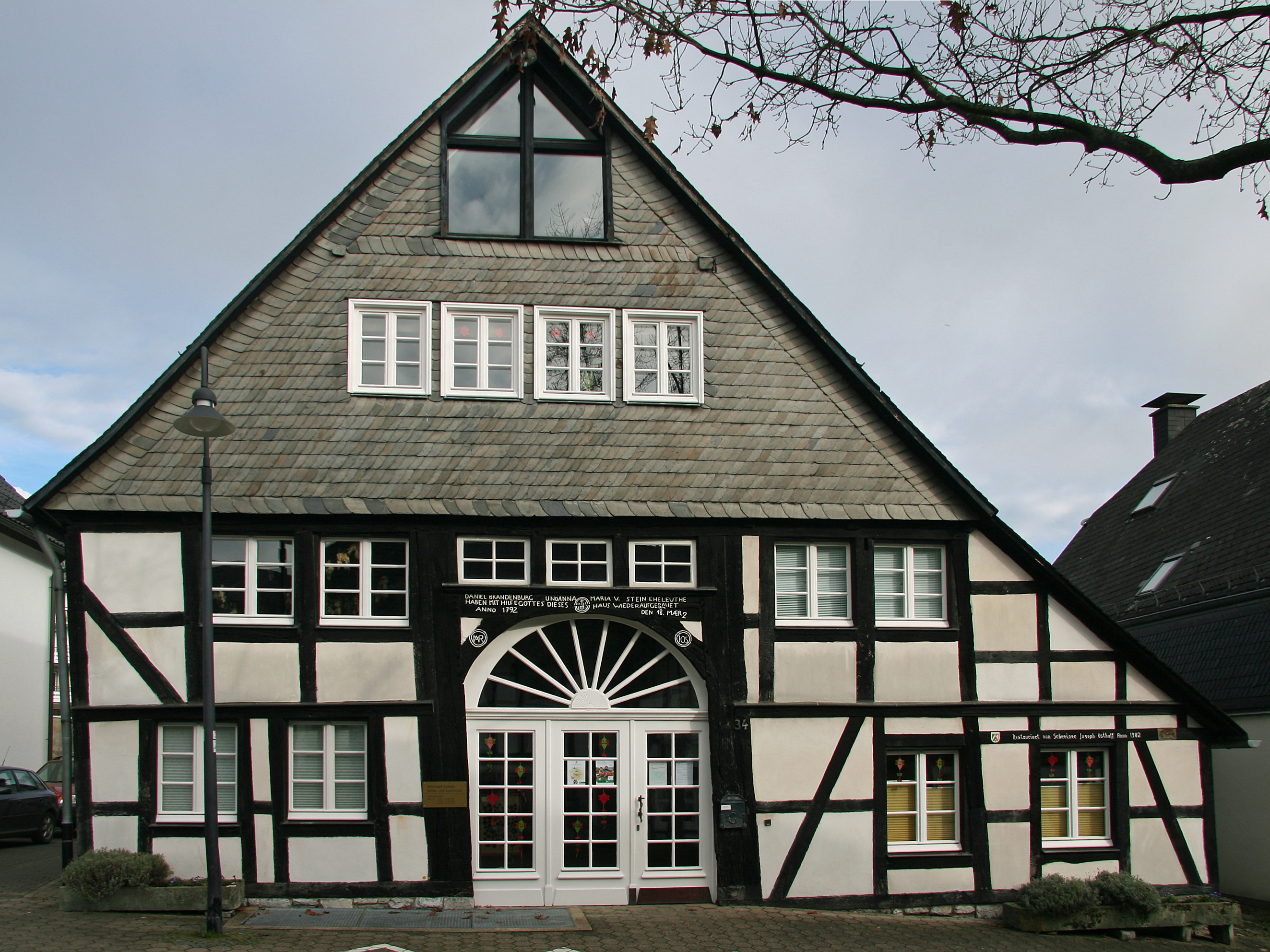 Denkmalgeschütztes Fachwerkhaus aus dem Jahr 1792 in der Niederen Straße 34, Brilon. Schriftzug auf dem Balken über dem Eingang lautet: DANIEL BRANDENBURG UND ANNA MARIA V. STEIN EHELEUTE HABEN MIT GOTTES HILFE DIESES HAUS WIEDER AUFGEBAUT ANNO 1792 DEN 18. MÆRZ This image shows a heritage building in Germany, located in the North Rhine-Westphalian city Brilon.